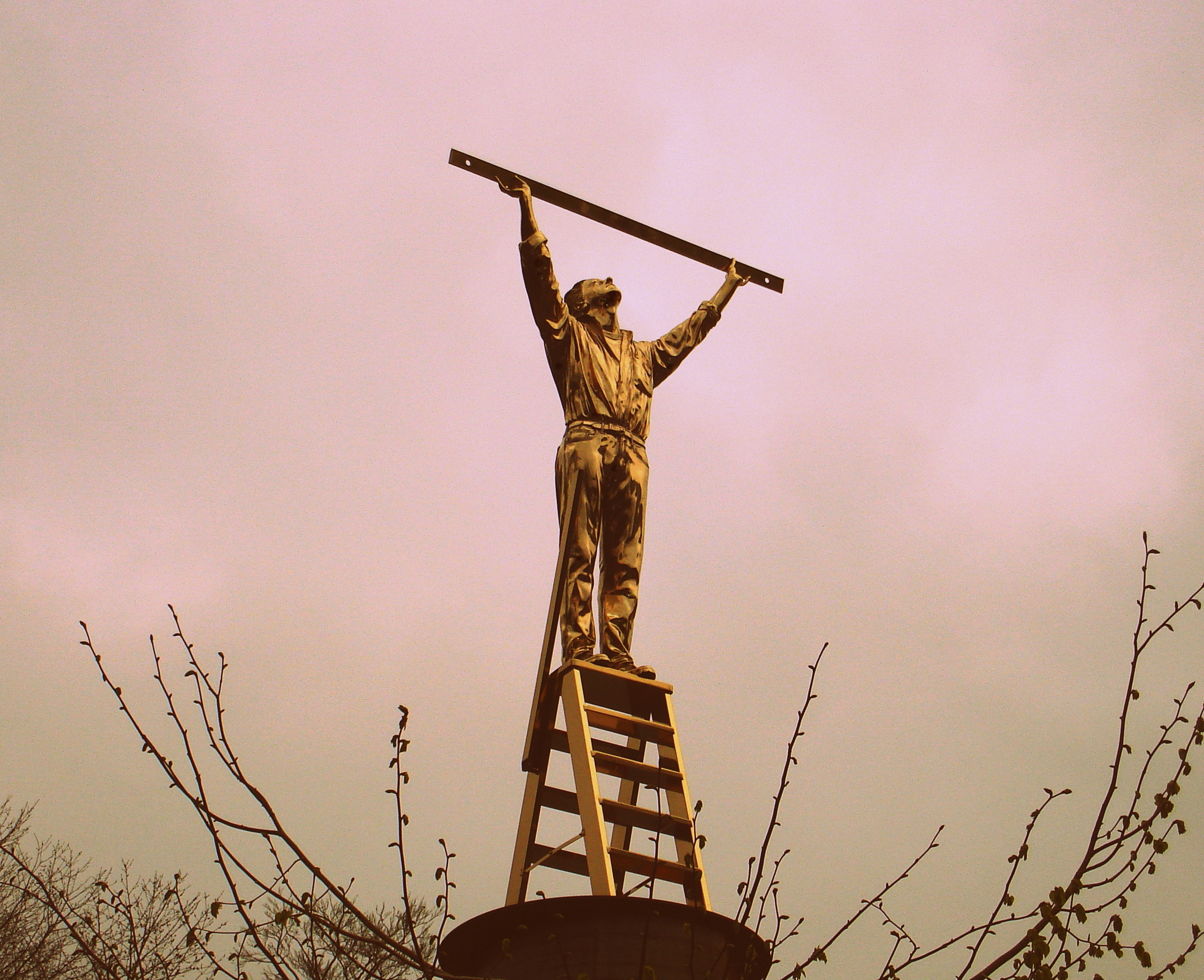 l'Homme qui mesure les nuage ( JAN FABRE )